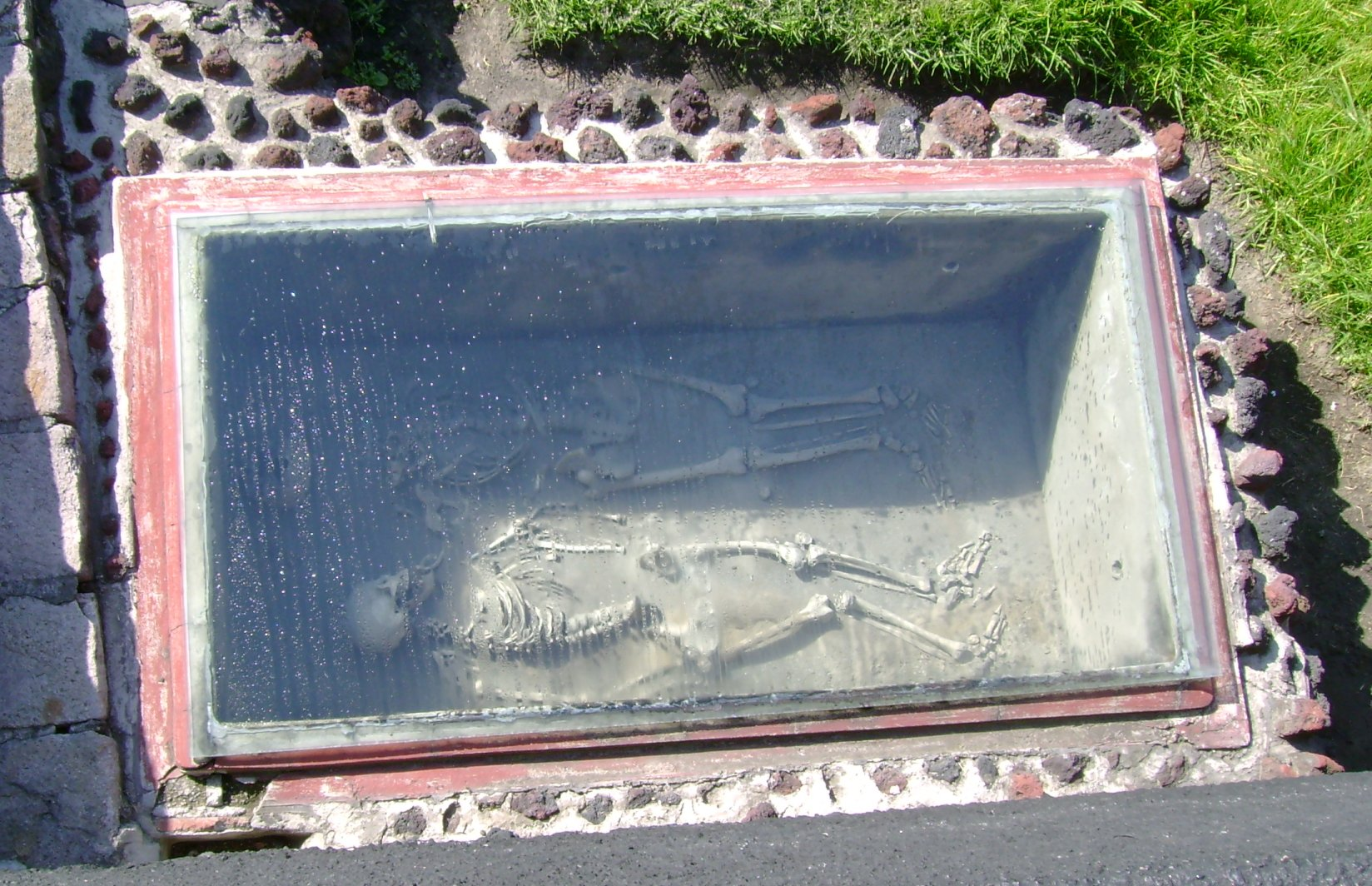 Amantes de Tlatelolco, Tlatelolco, Cidade do México